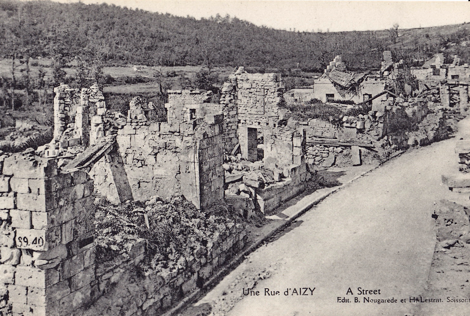 Carte postale ancienne éditée par B. Nougarède et H. Lestrat à Soissons :Une rue d'AIZY